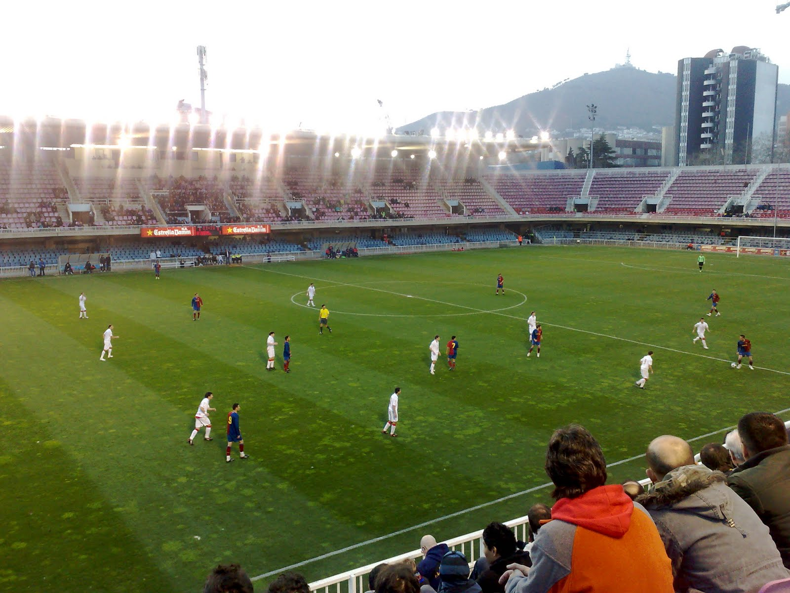 Partido del Barça B en el Mini Estadi. Temporada 2008-2009.